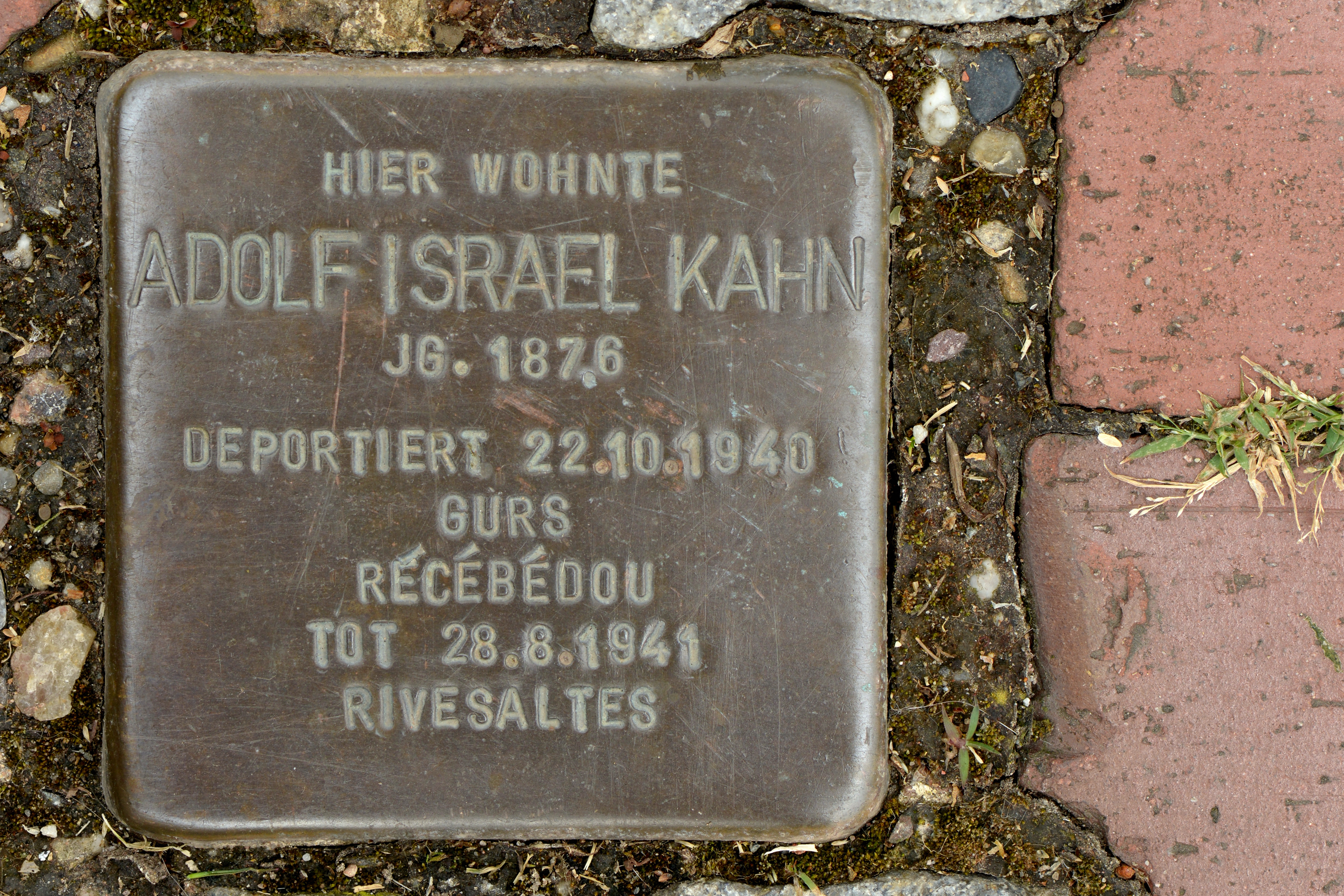 Adolf Israel Kahn war der letzte Vorsitzende der Synagogengemeinde Illingen, Saarland. Der Stolperstein befindet sich in Illingen, Saarland in der Hauptstraße zwischen der Einfahrt zum Parkdeck und dem Anwesen "Hauptstraße 16" (Sportgeschäft)